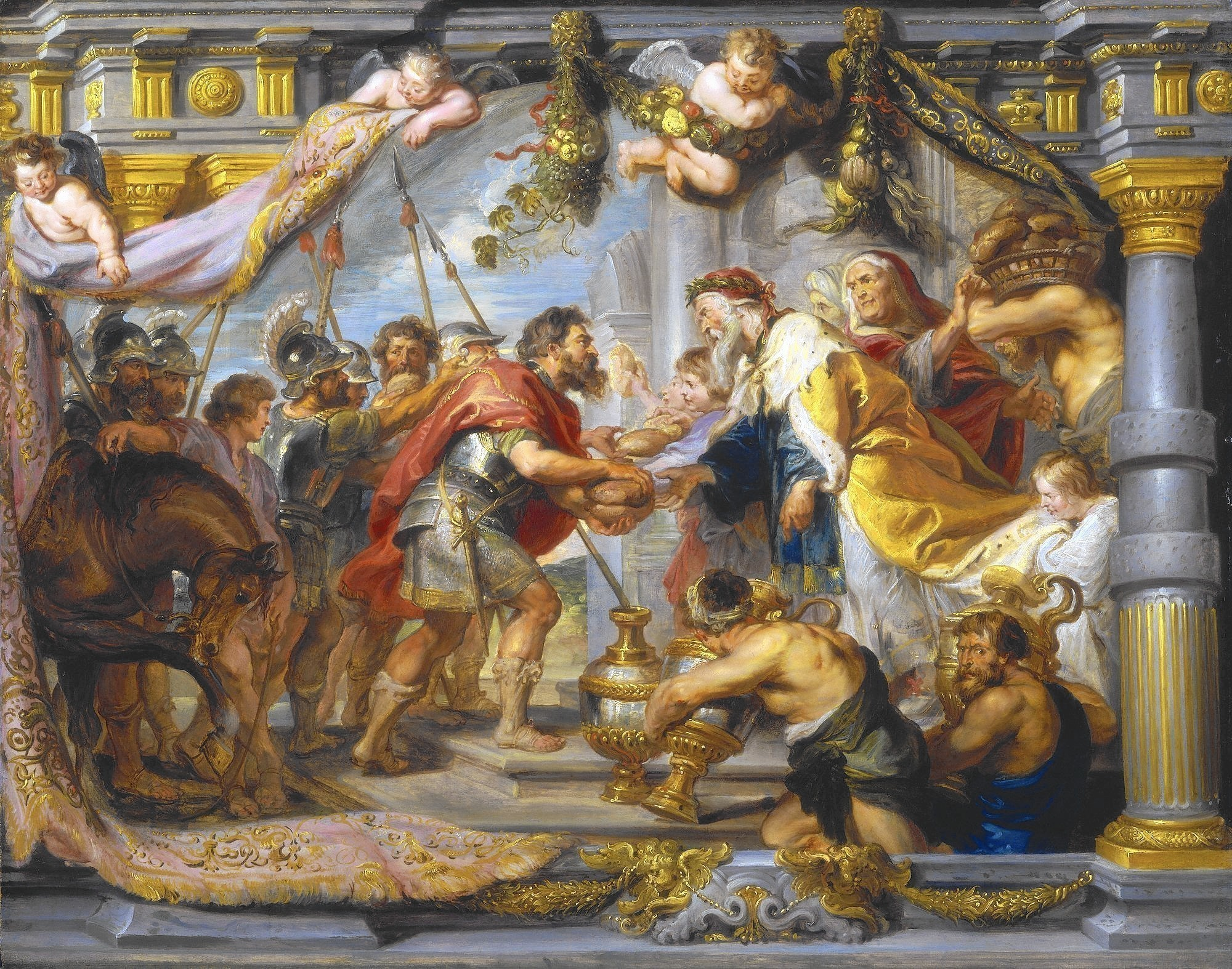 Face à face du pouvoir temporel (représenté par Abraham en armure et ses soldats) et spirituel (représenté par Melchisédech et ses serviteurs, avec corbeille de pains et aiguières).